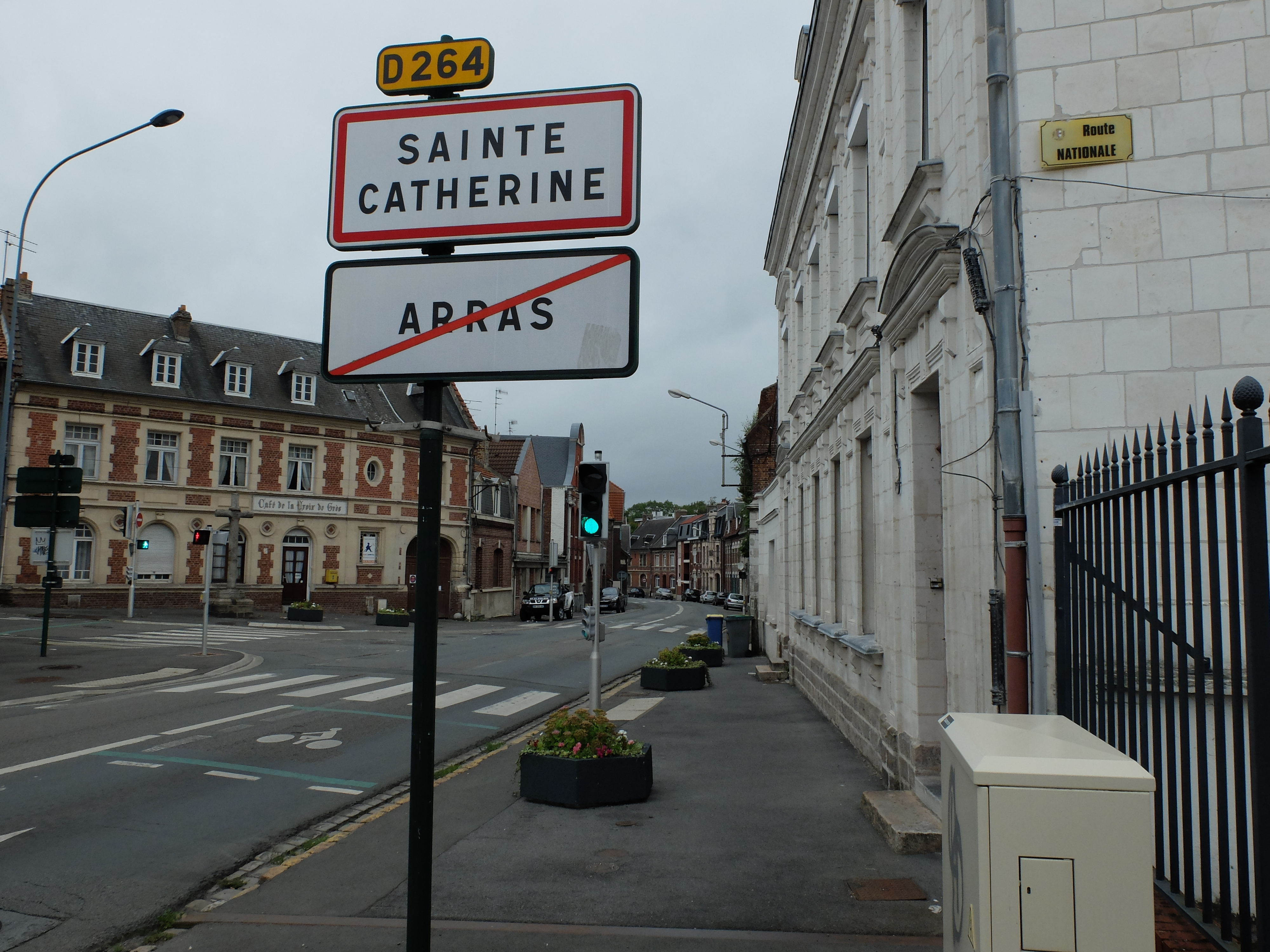 Vue d'une entrée de Sainte-Catherine (Pas-de-Calais).